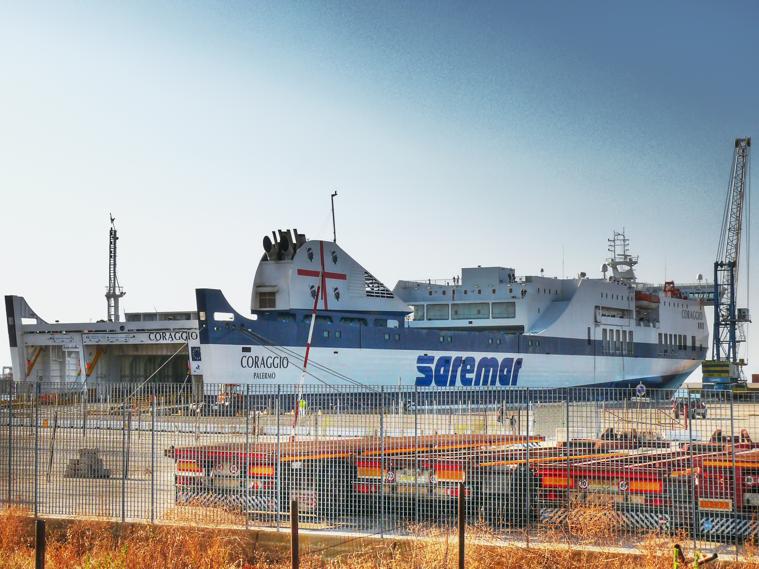 Nave Saremar al porto industriale di Porto Torres Unknown